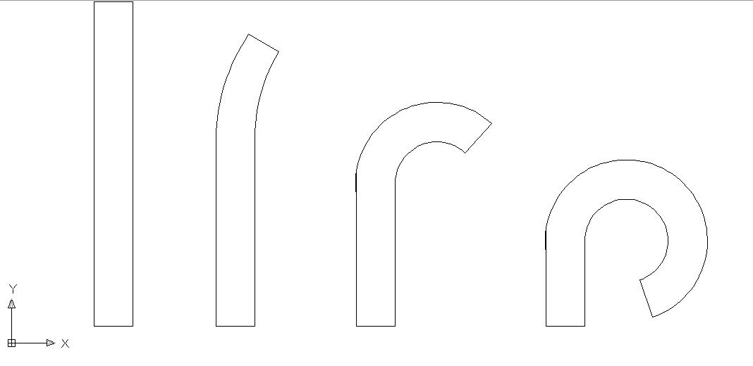 bordonado